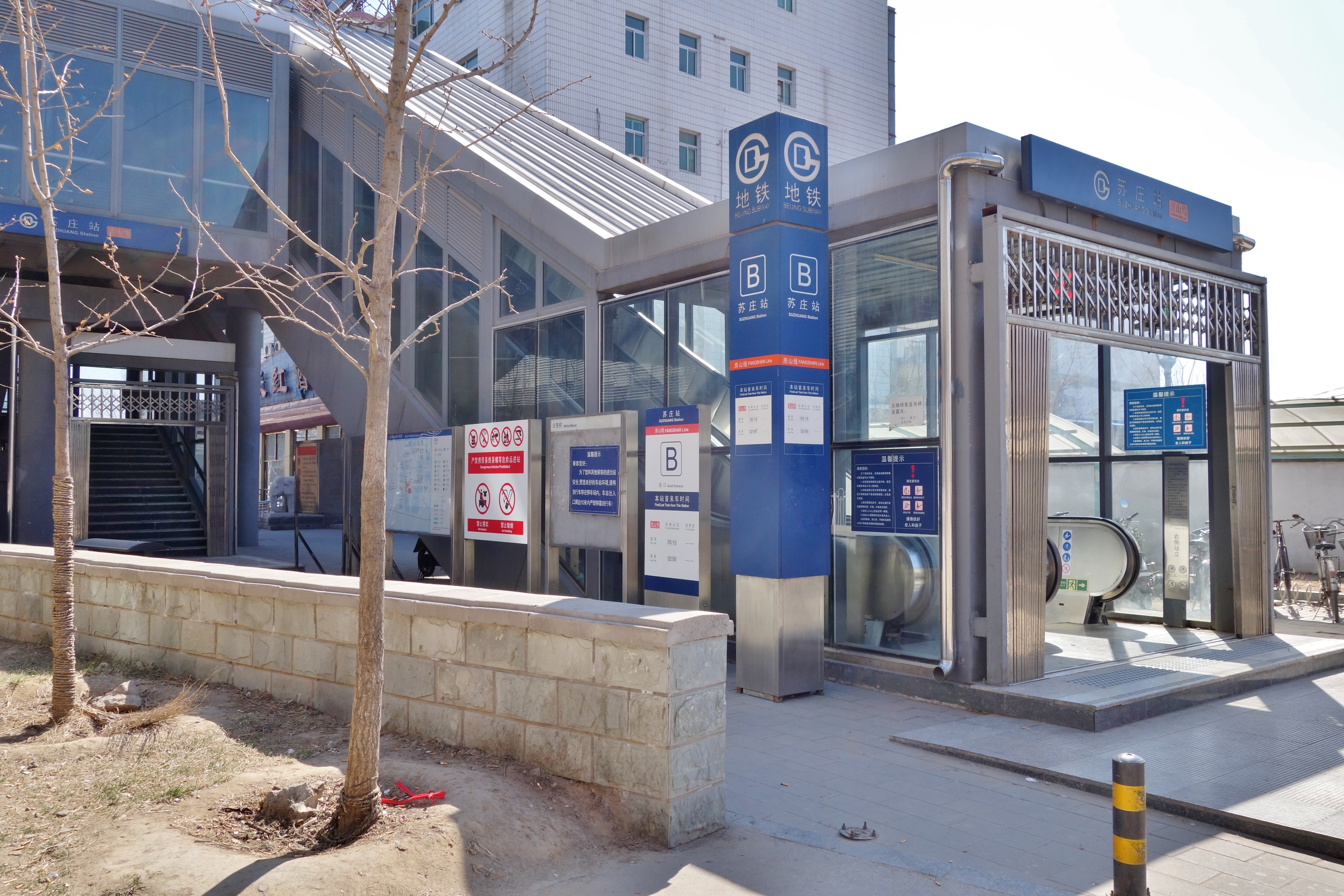 苏庄站B出口